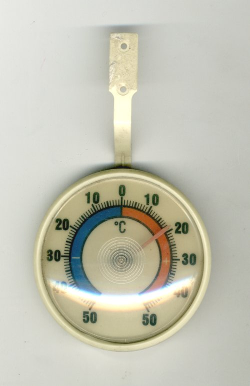 Termotetr zaokienny bimetaliczny Own work January 2007